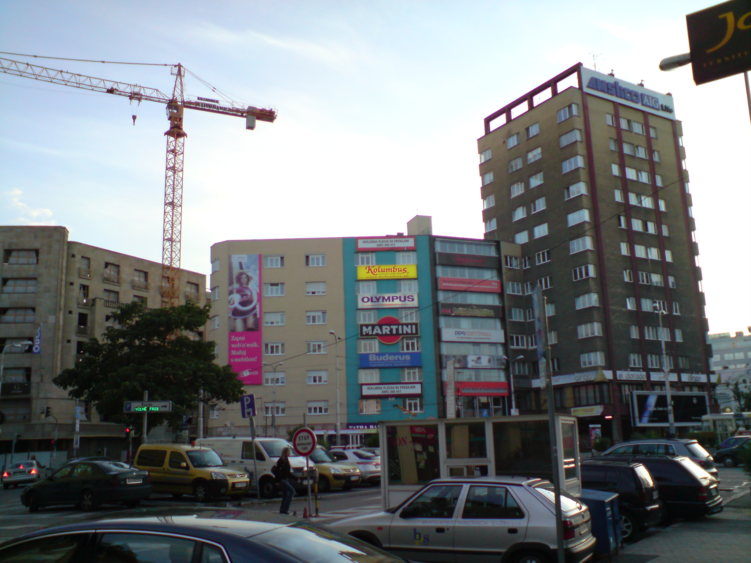 Manderla z Kamenného námestia